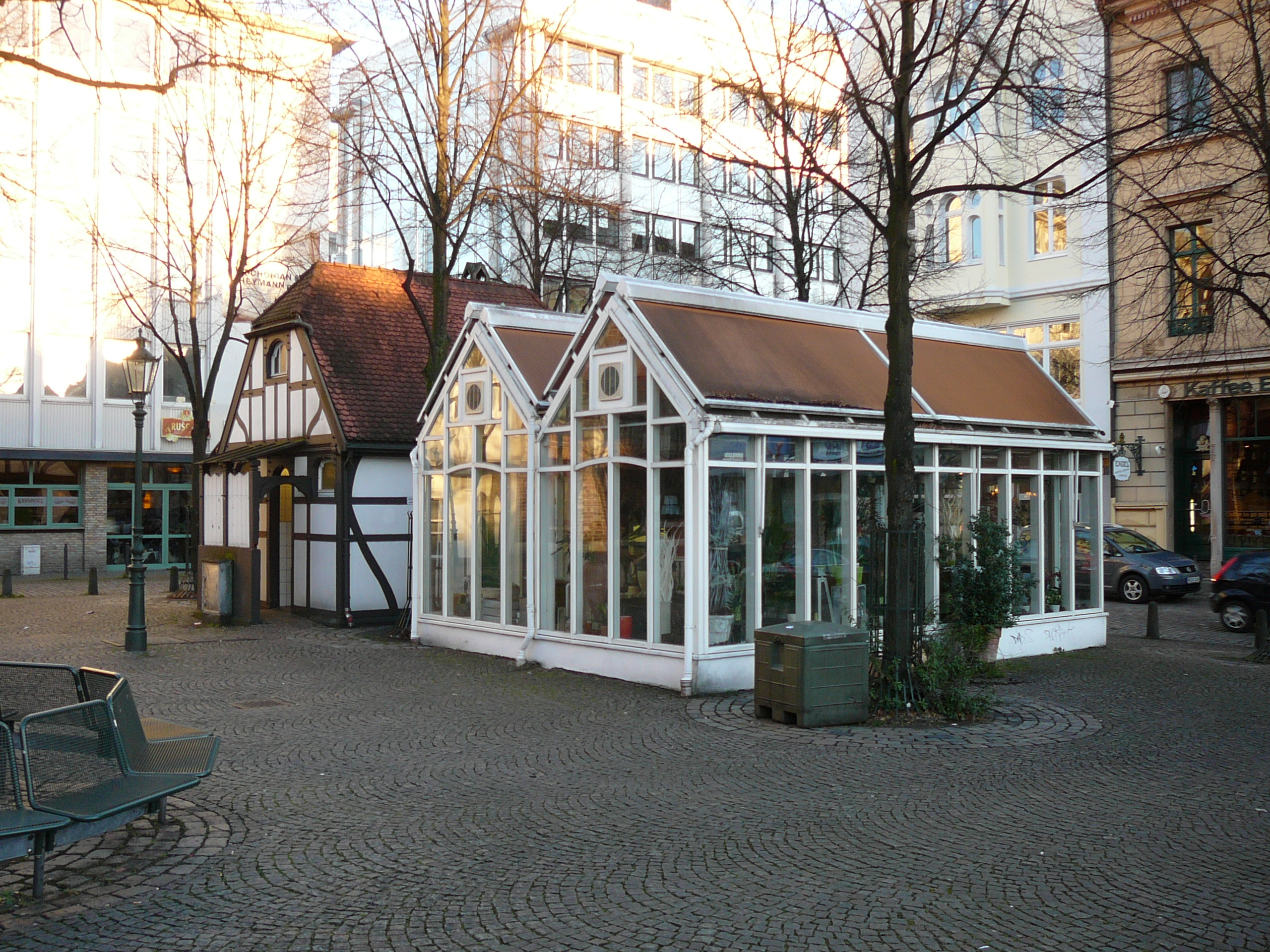 Friedrich-Ebert-Str, Wuppertal